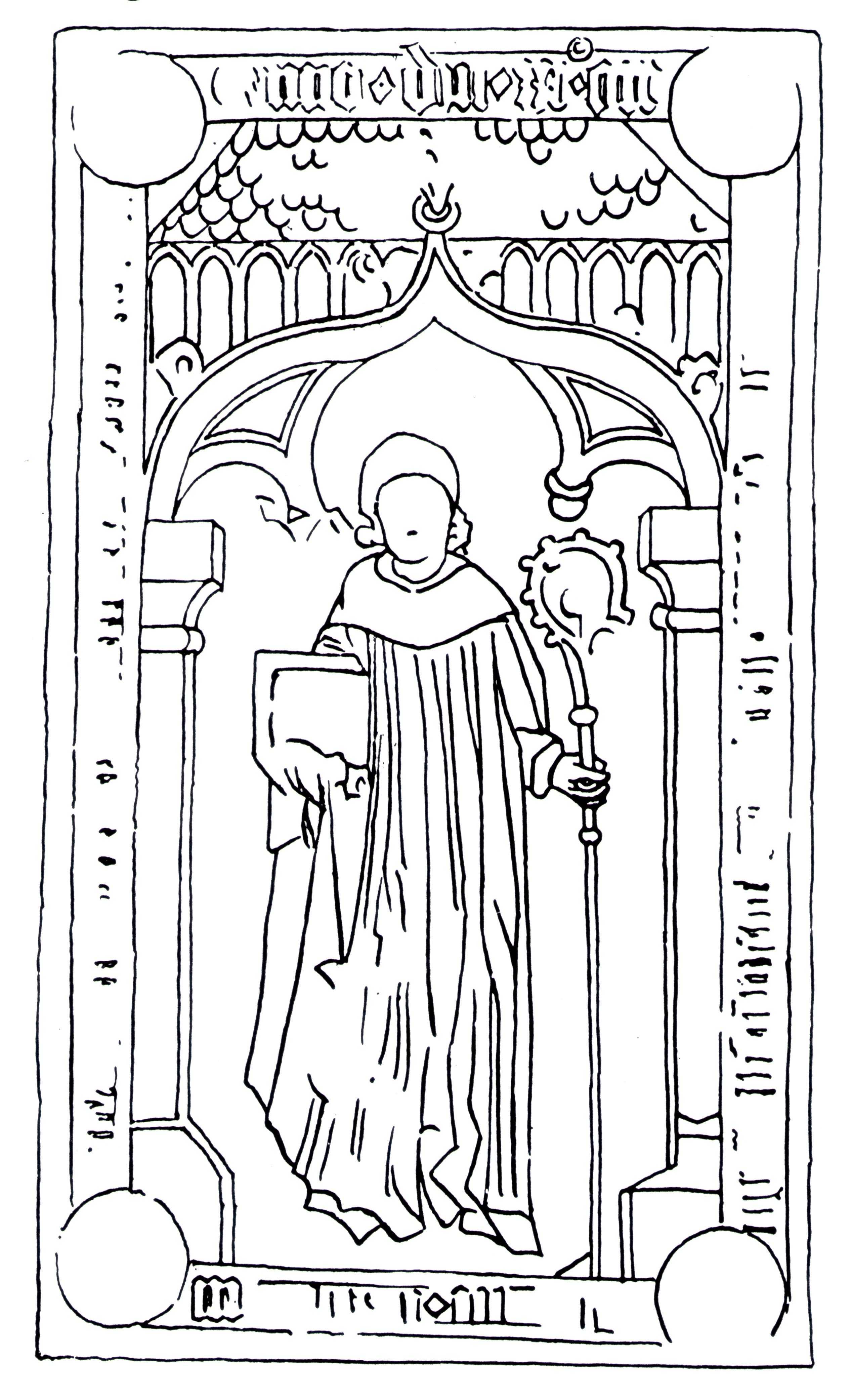 Grabplatte Abt Tobias vom Kloster Chorin, nach 1467; vor 1500; zweidimensionale Kopie von Eichholz/Hoppe 1927